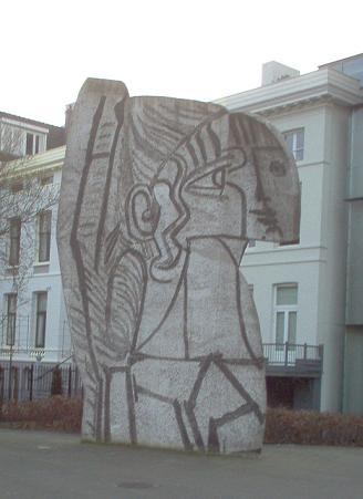 Dit beeld van Picasso (Sylvette) staat midden in Rotterdam, niet zo ver van de Pauluskerk en de Kruiskade vandaan. Zelfgemaakte foto.